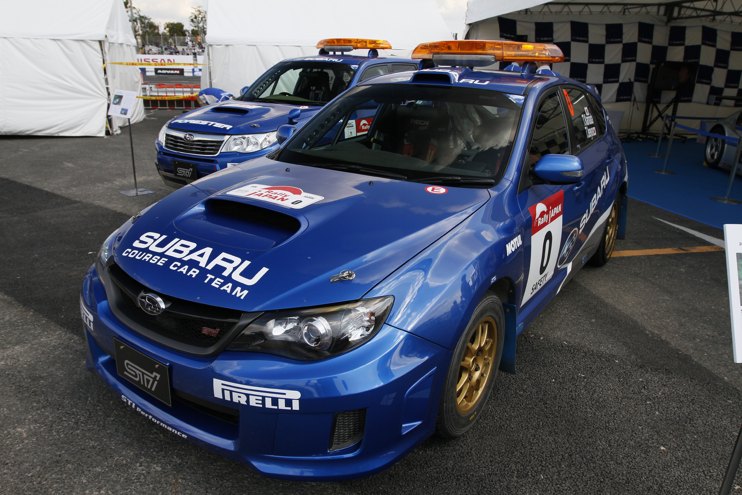 Motorsport Japan 2010: Subaru Impreza WRX Sti, 2010 Rally Japan Zero car.